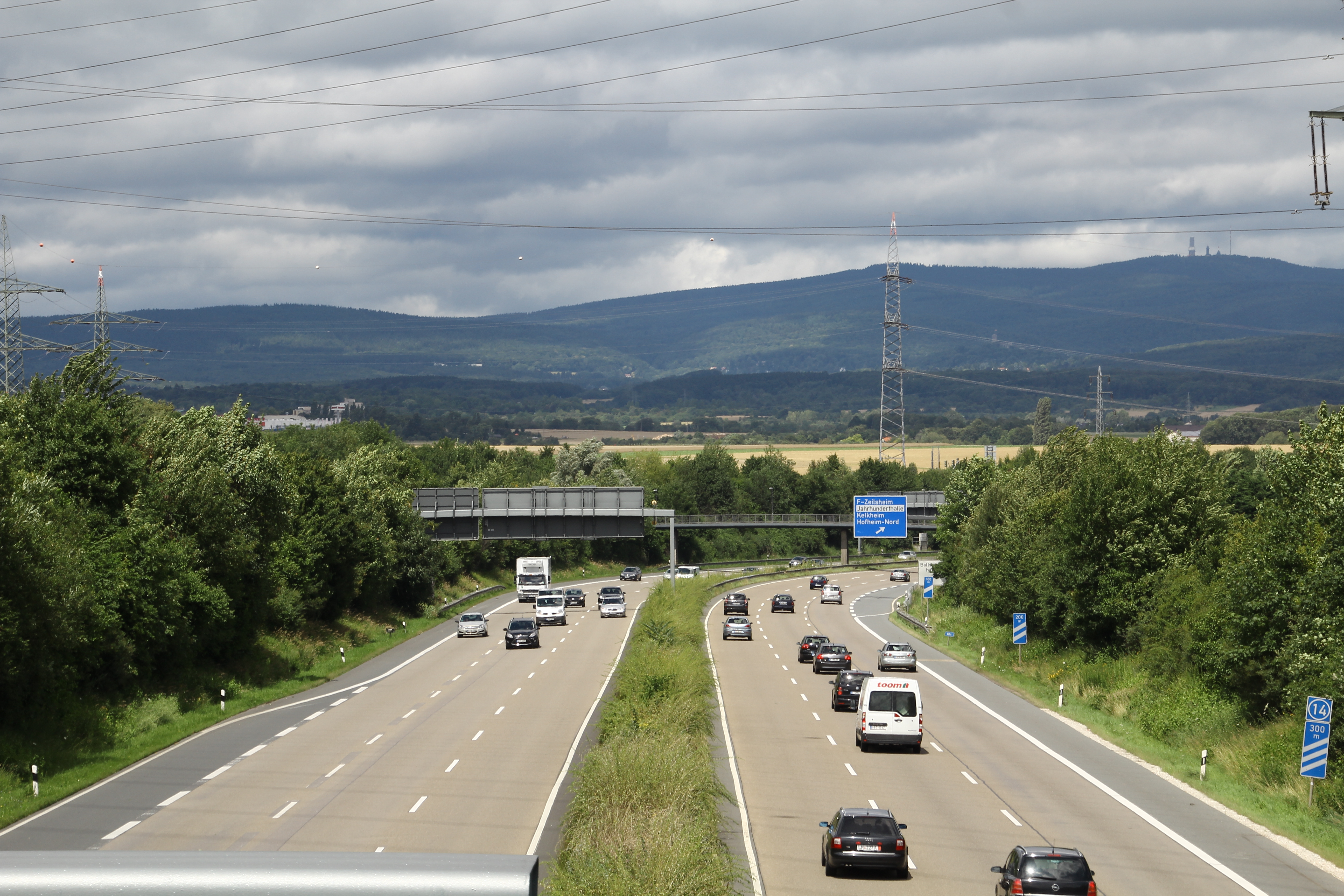 BAB 66 zwischen Krifteler Dreieck und Anschlussstelle Frankfurt-Zeilsheim